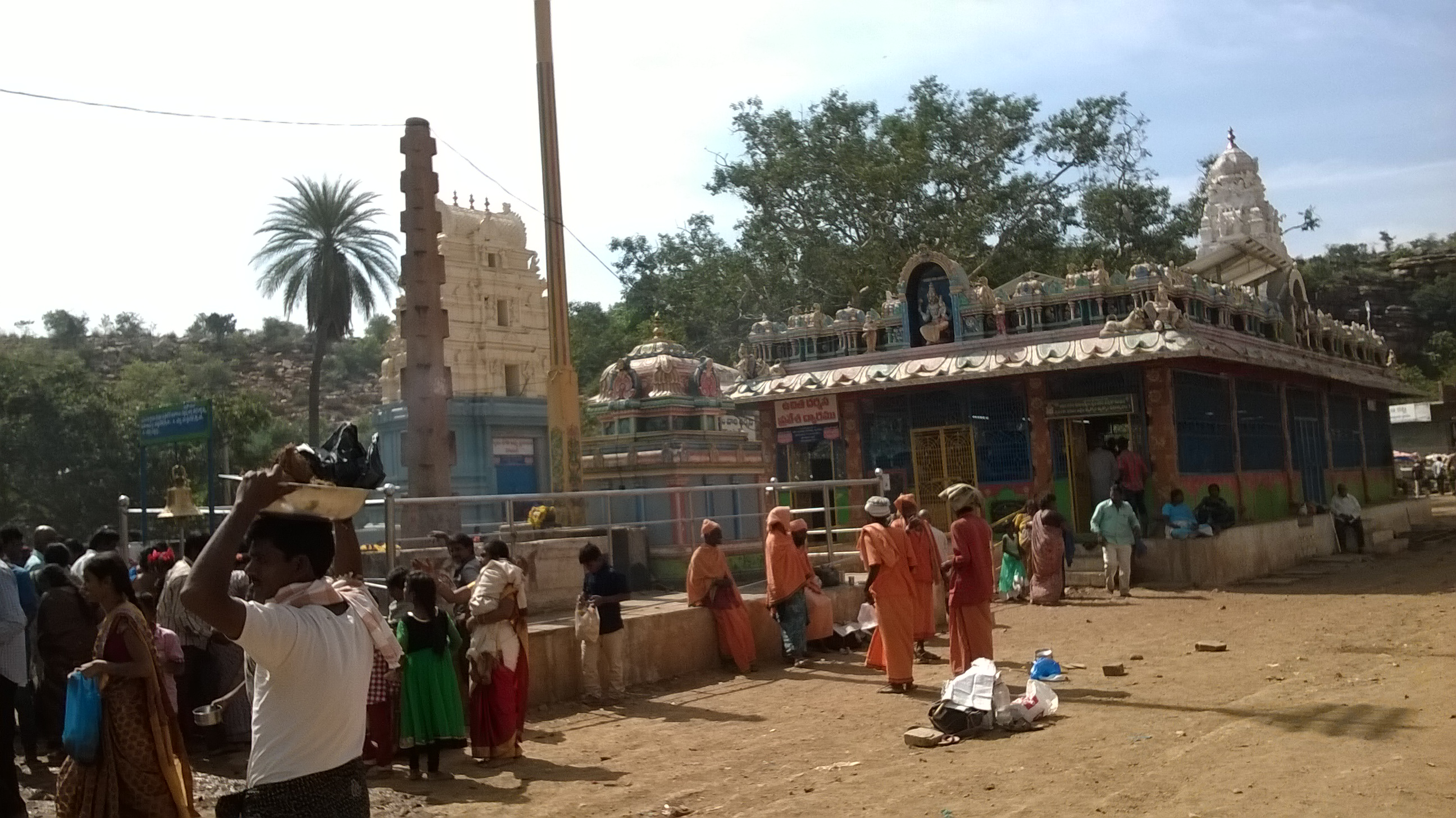 శ్రీమద్దిలేటి నరసింహస్వామి దేవాలయం,రంగాపురం